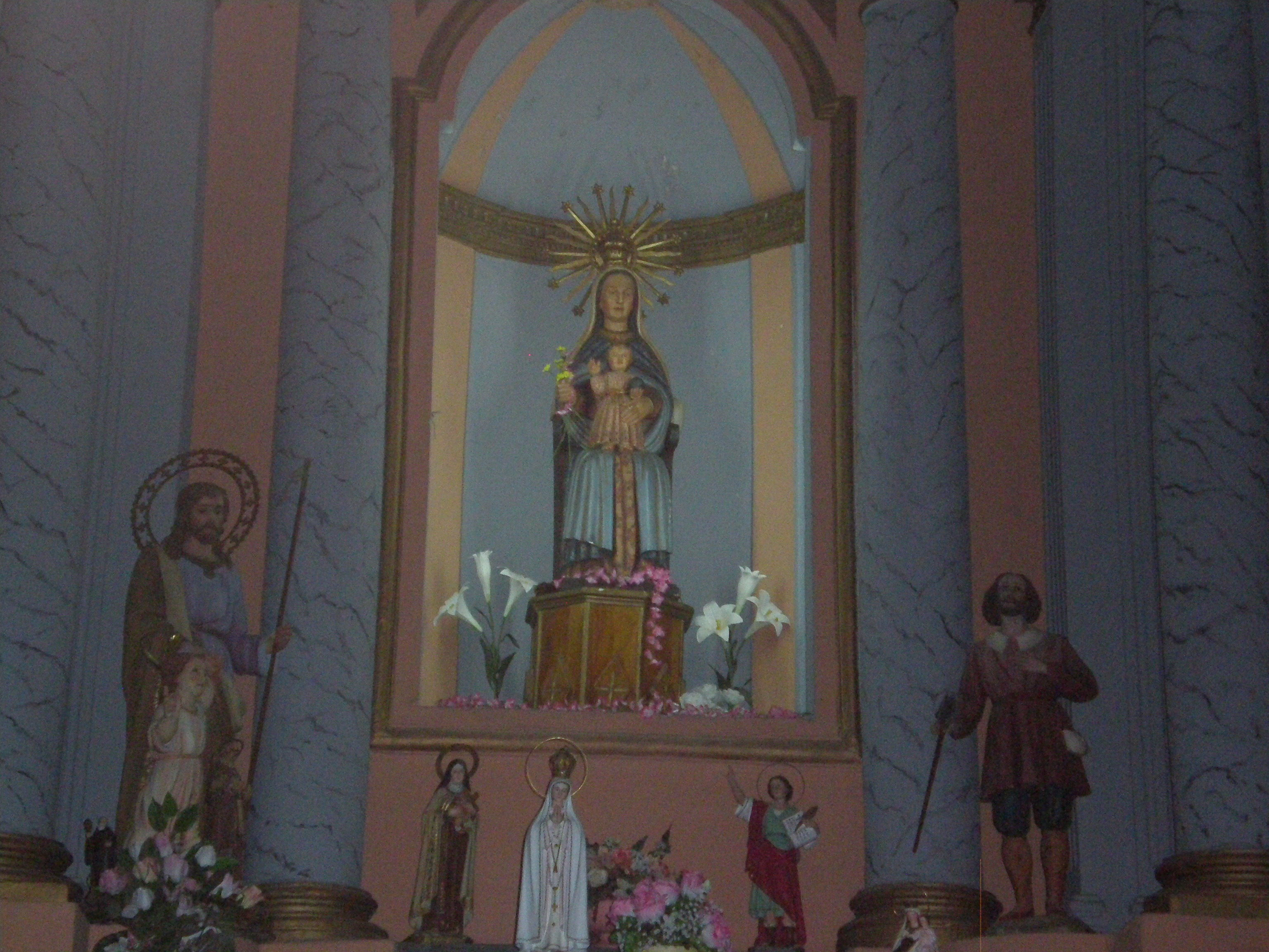 Estatua de laIglesia de Santa Maria de Castellar de n'Hug